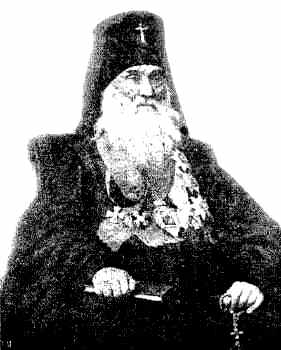 Полтавский епископ Иларион (Иван Ефимович Юшенов) (1824-1904)